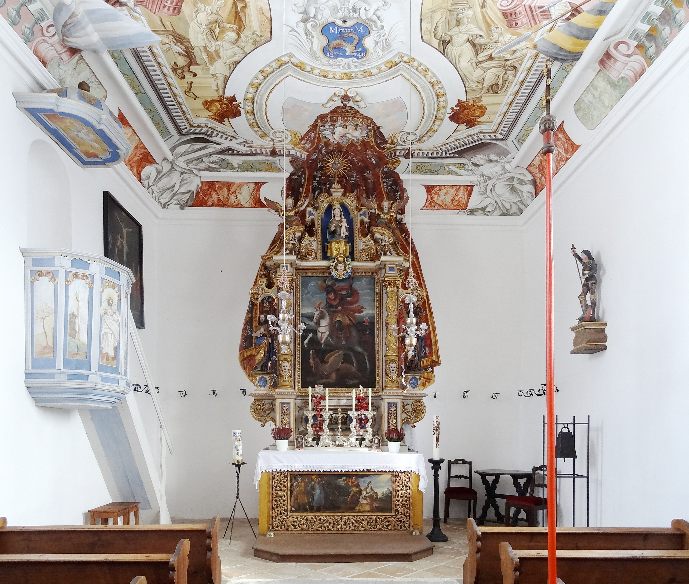 Ramsachkircherl, Blck durch die Kirche von West nach Ost